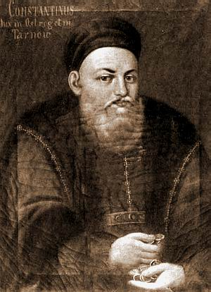 Konstanty Wasyl Ostrogski